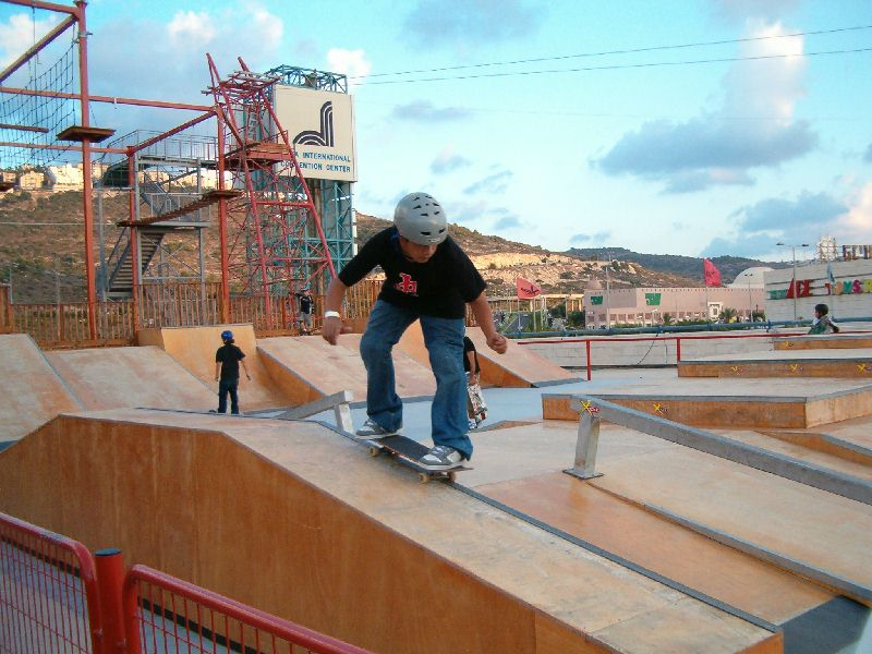 ליאל דאדו אלוף סבב הילדים בסקייטבורד לשנת 2005 בסקייטפארק בחיפה. צילם י.ש. 15:23, 22 מרץ 2006 (UTC)